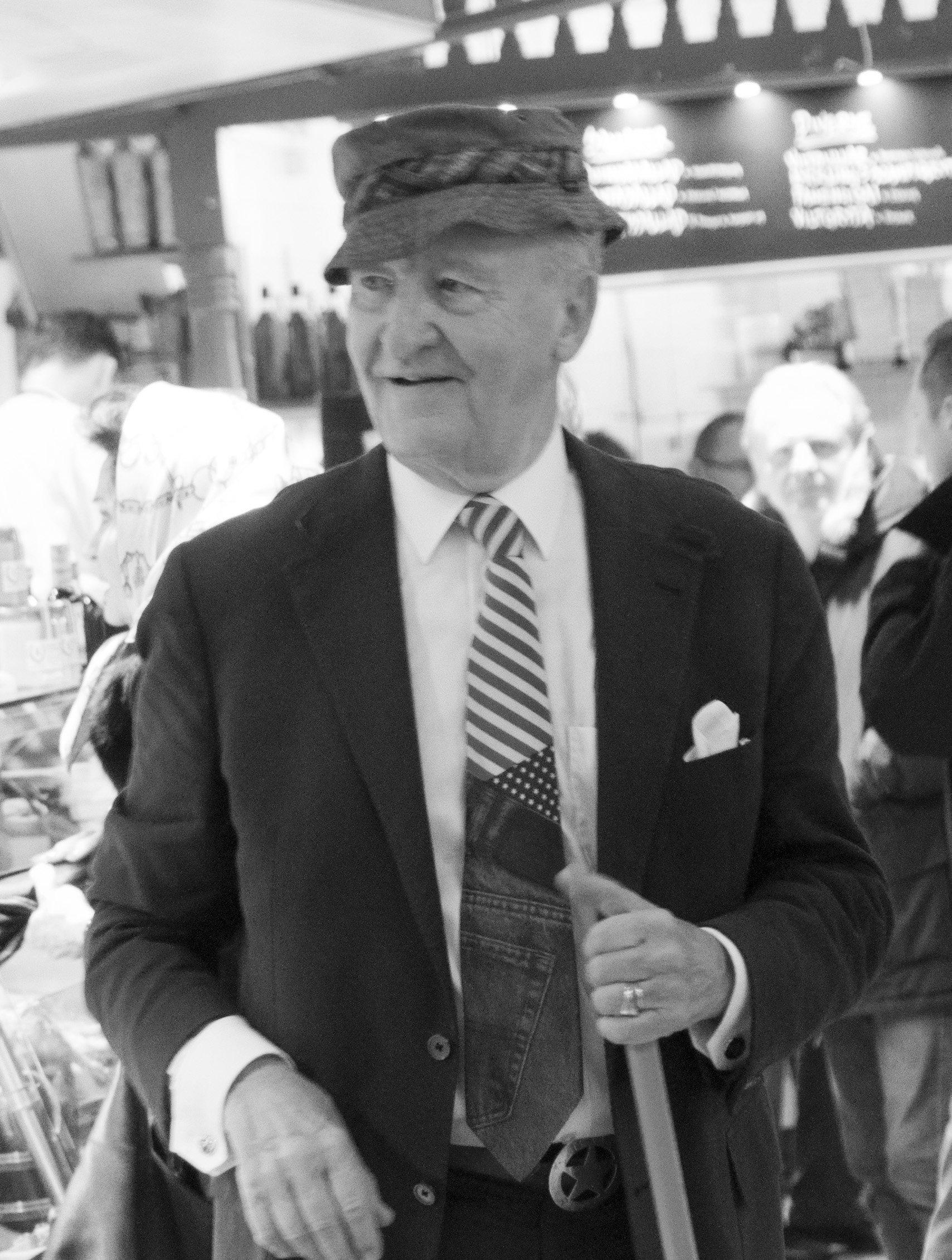 Ian Wachtmeister i Östermalms Saluhall